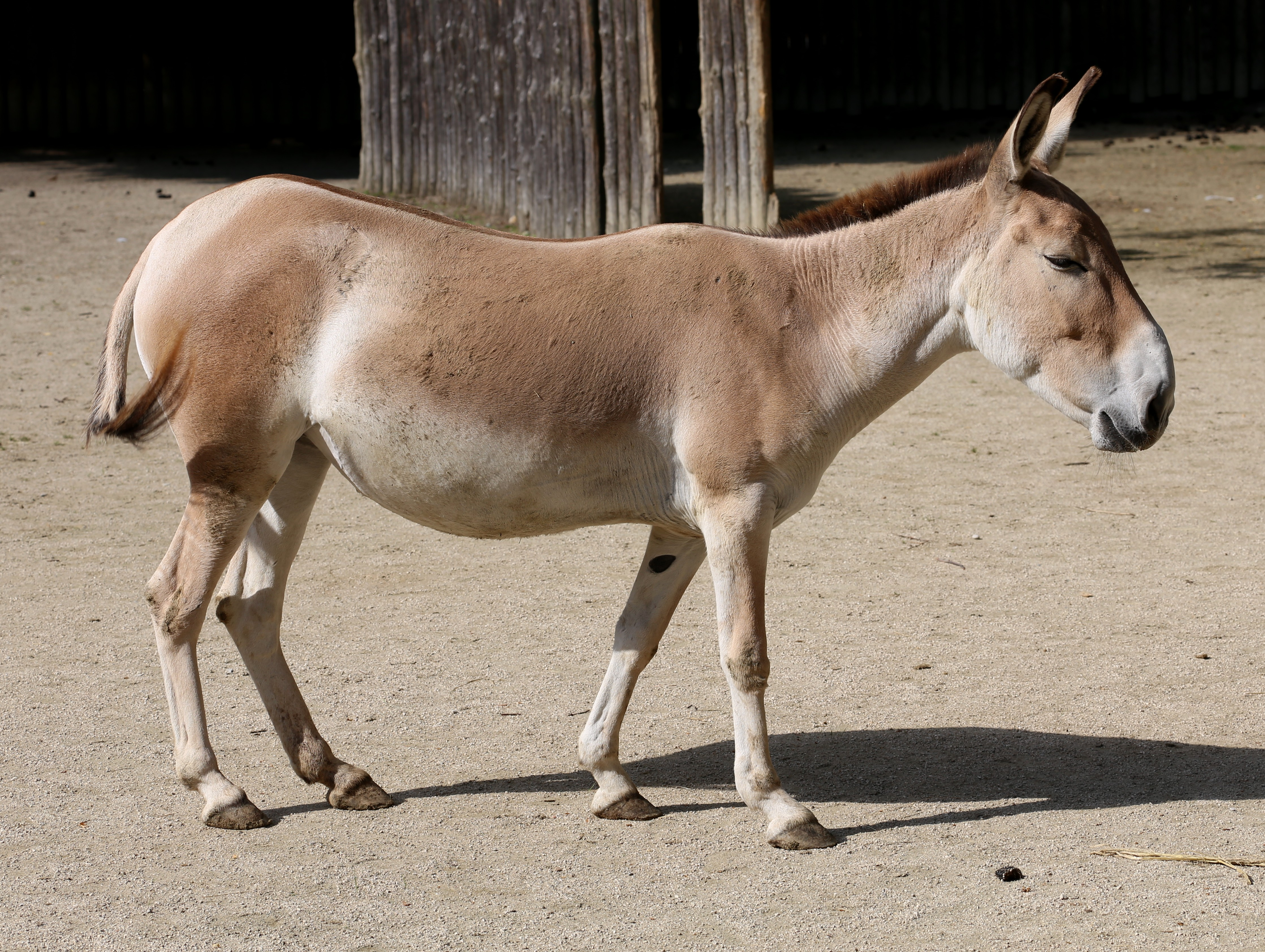 Onager (Asiatischer Wildesel), Equus hemionus onager, Zoo Augsburg